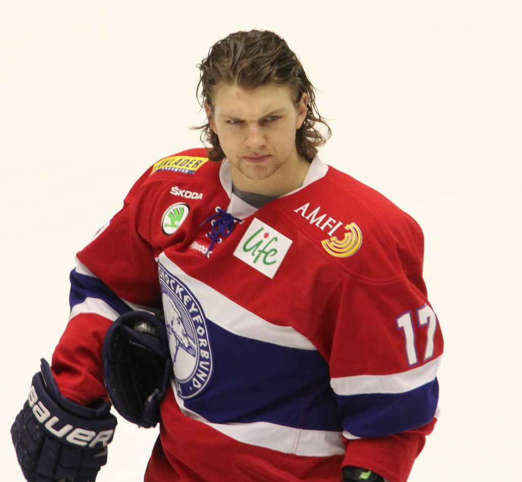 Henrik Ødegaard i DNB Arena (Stavanger) i forbindelse med landskamp Norge- Russland 20.april. 2013.